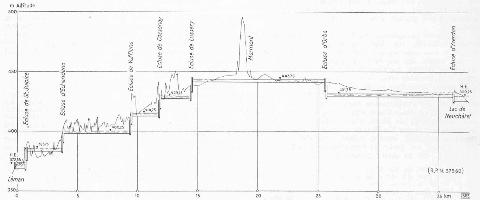 Längenprofil des Canal d'Entretroches gemäss Projekt W. Martin, 1912